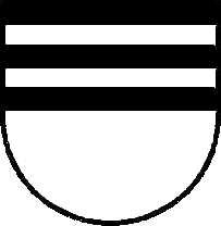 Loštice znak